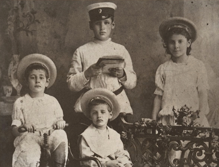 Les trois garçons de ma famille Kessel (Joseph debout au centre), photographie vers 1907 ou 1908 à Orenbourg en Russie. Publiée dans « Kessel » d’Ivan Stephen, Alain Da Cunha, Arlette Moreau, éd. Plon (1985). Photographe inconnu.